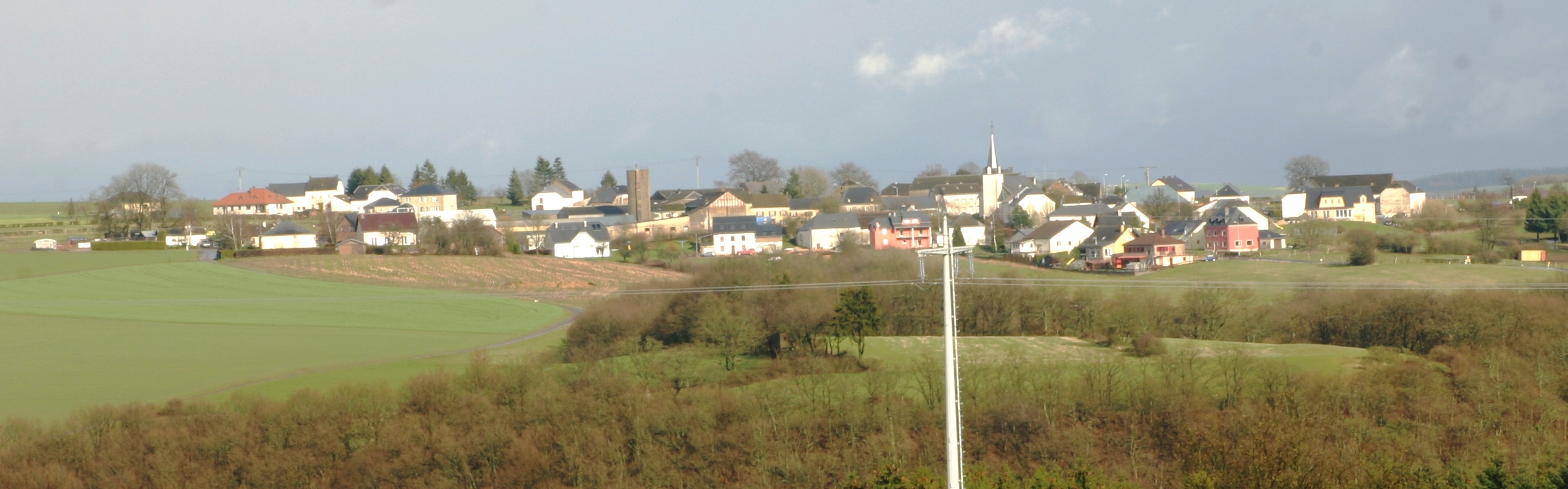 Mierschent vun Houschent aus gesinn.